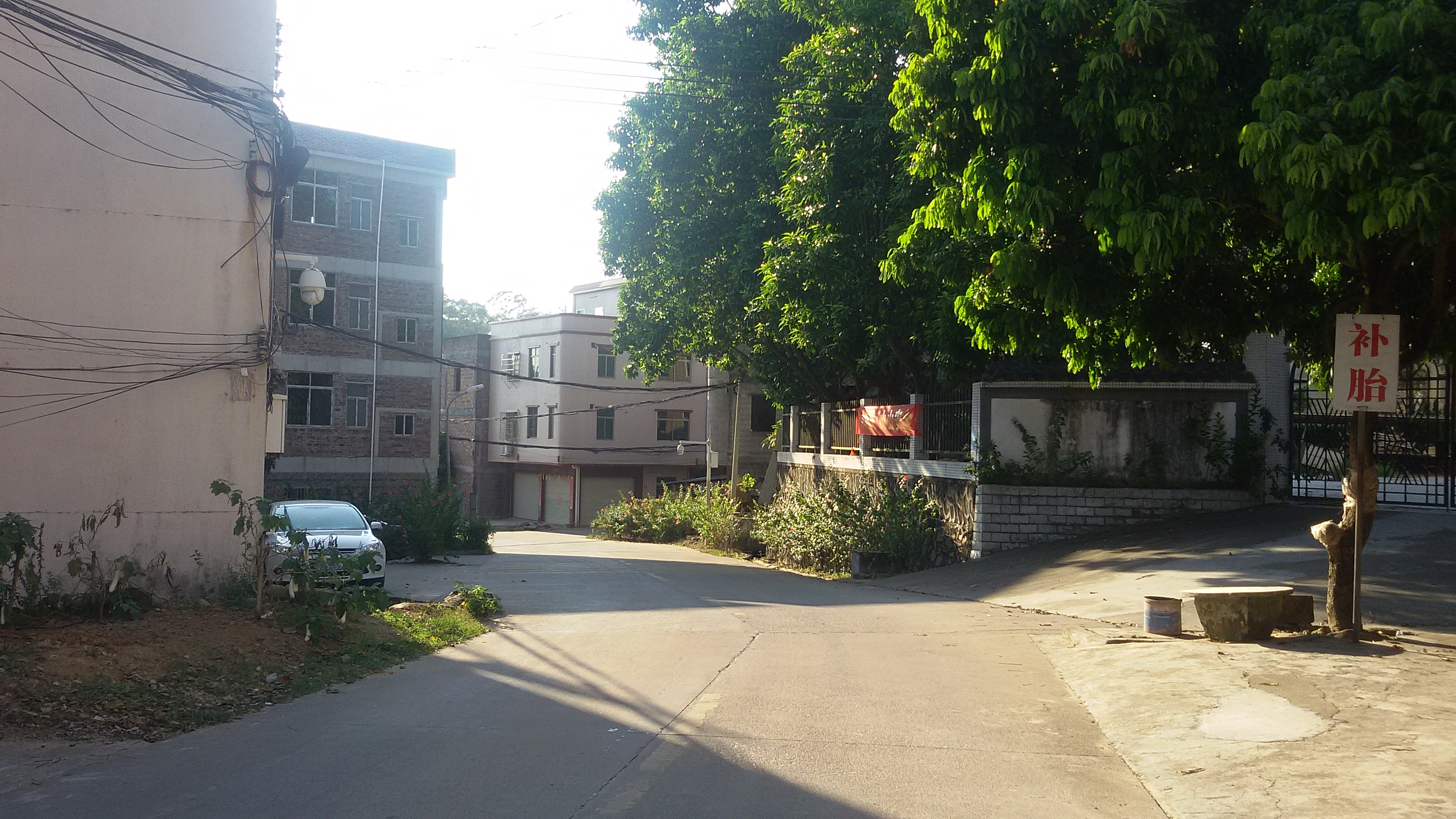 粵語: 广州市黄埔区九龙镇佛塱村